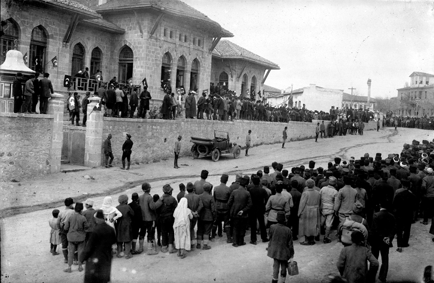 Türkiye Büyük Millet Meclisi, Ankara (1920)